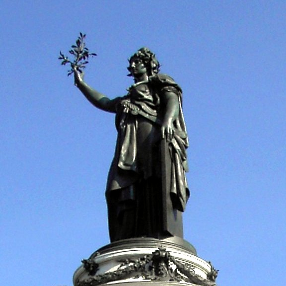 Paris, place de la République